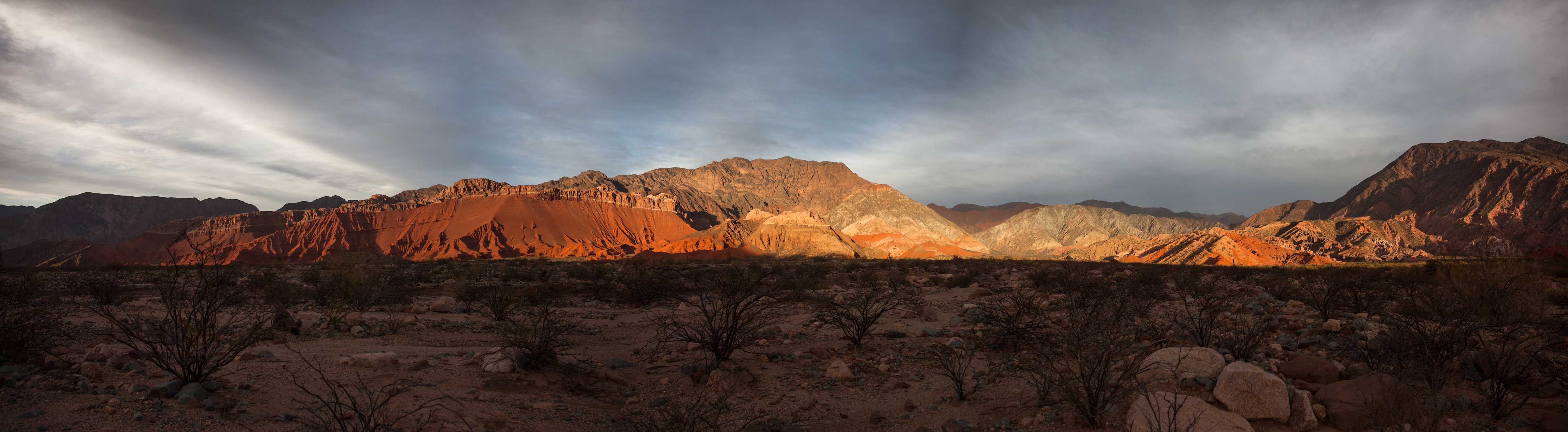 Quebrada de las Conchas. Cafayate. Salta. Argentina